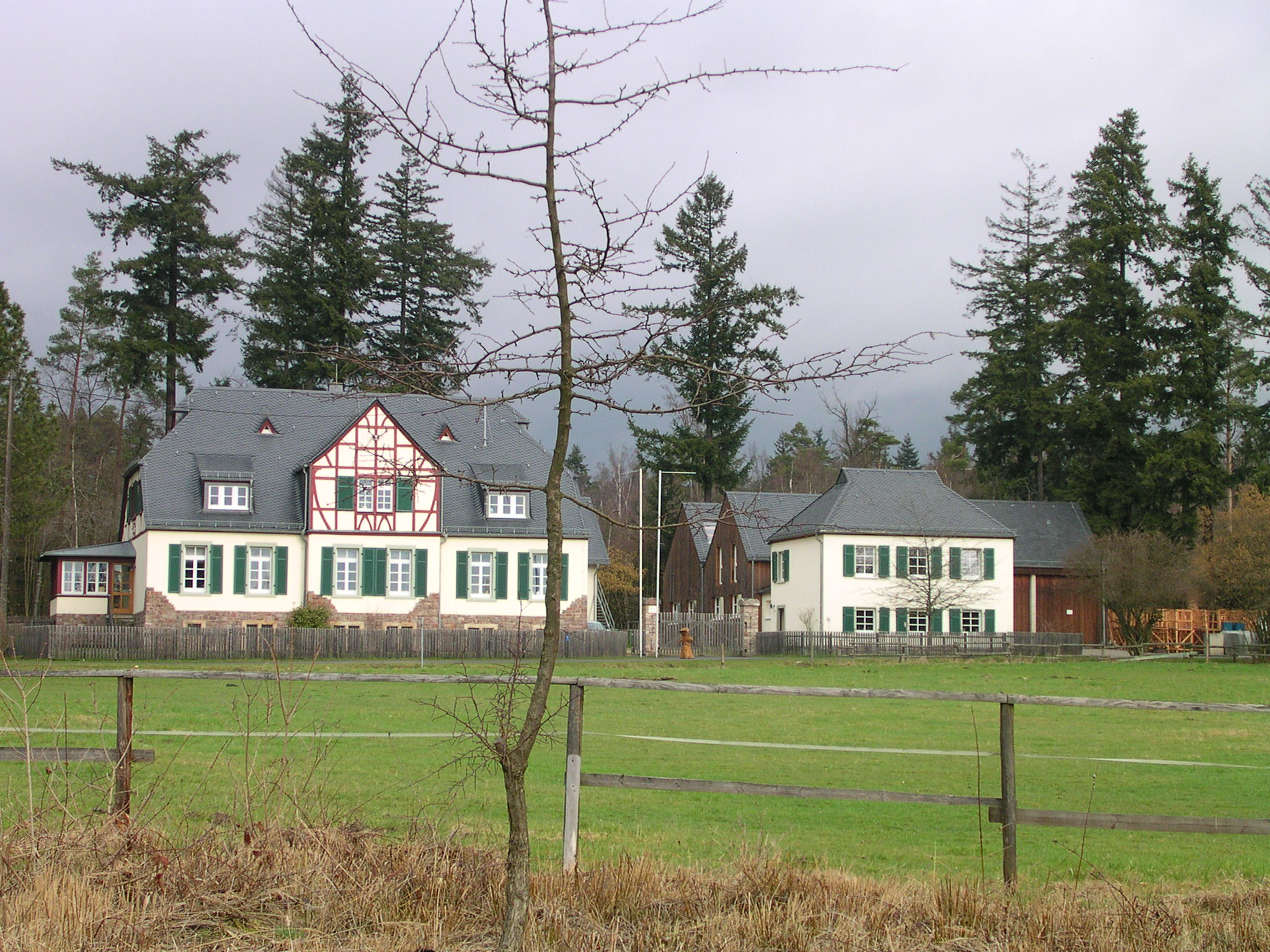 Forsthaus Entenpfuhl